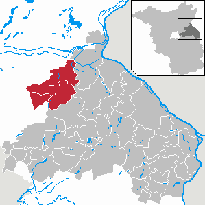 Amt Falkenberg-Höhe in Brandenburg (Country) - District Märkisch-Oderland